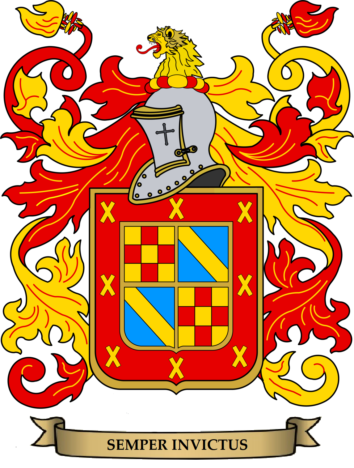 Escudo de armas de la Casa de Ausa (Navarra)